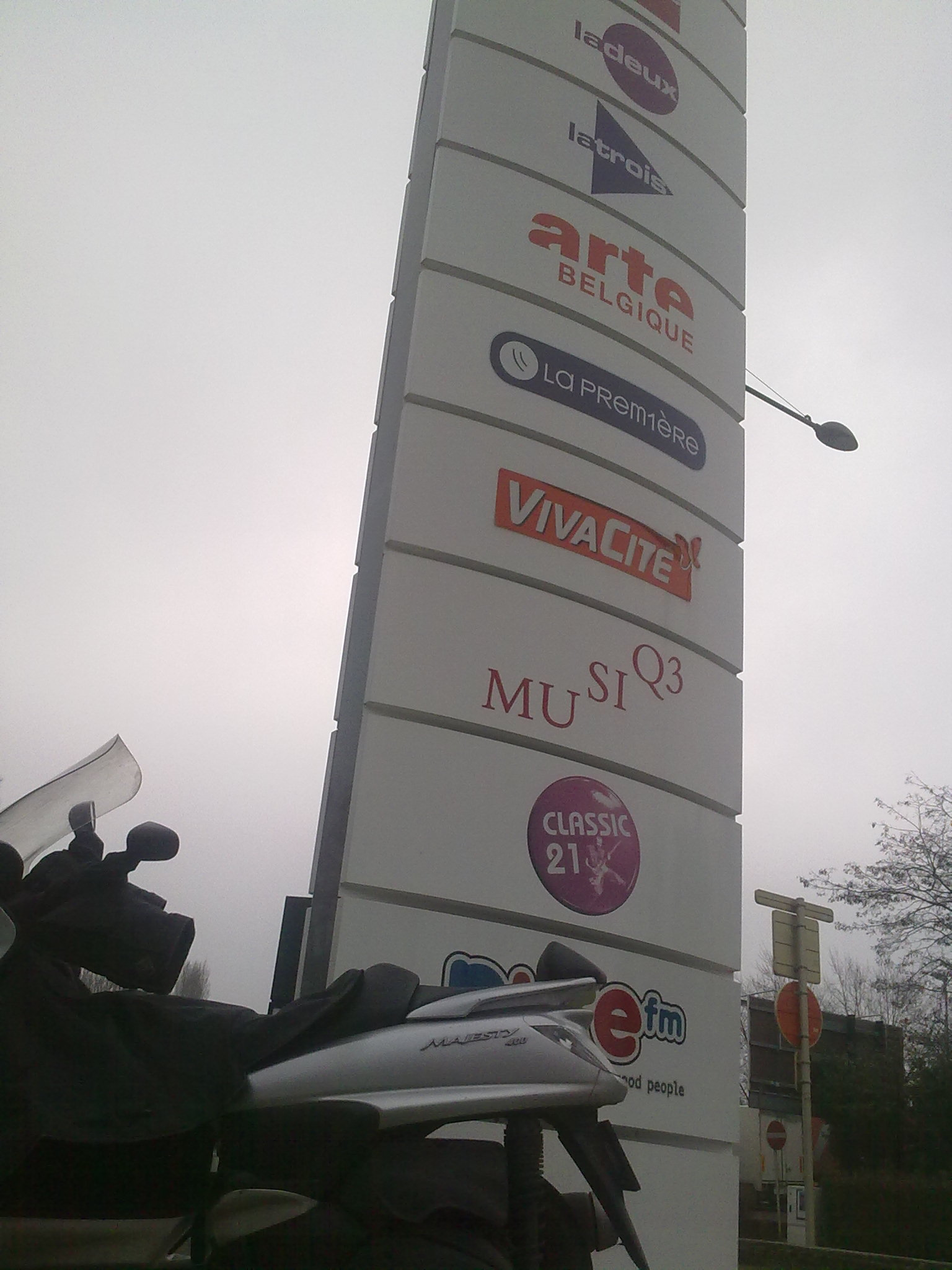 RTBF : logo des chaînes. signalétique extérieure au Boulevard Reyers à Bruxelles.